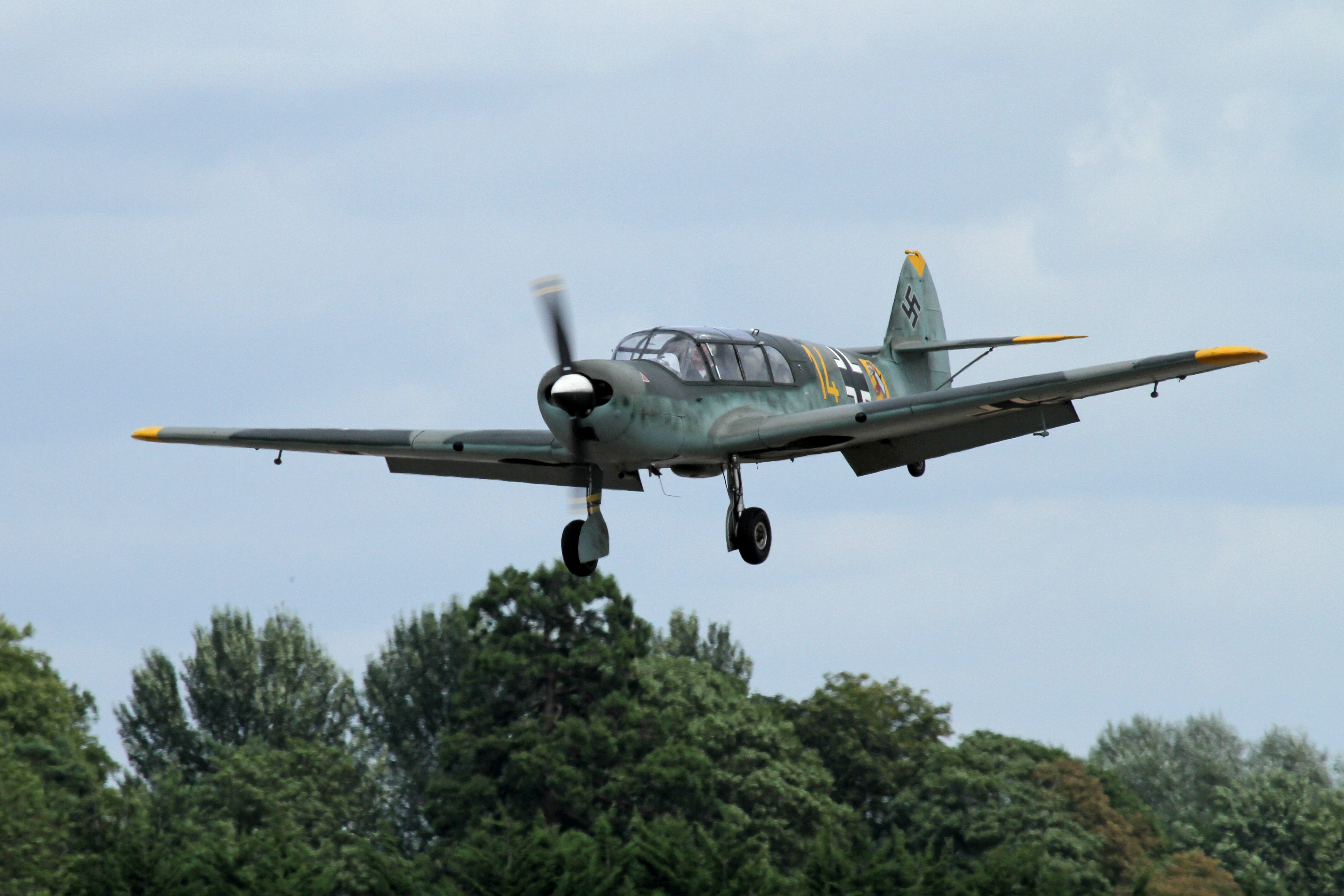 Messerschmitt 108 Taifun 01